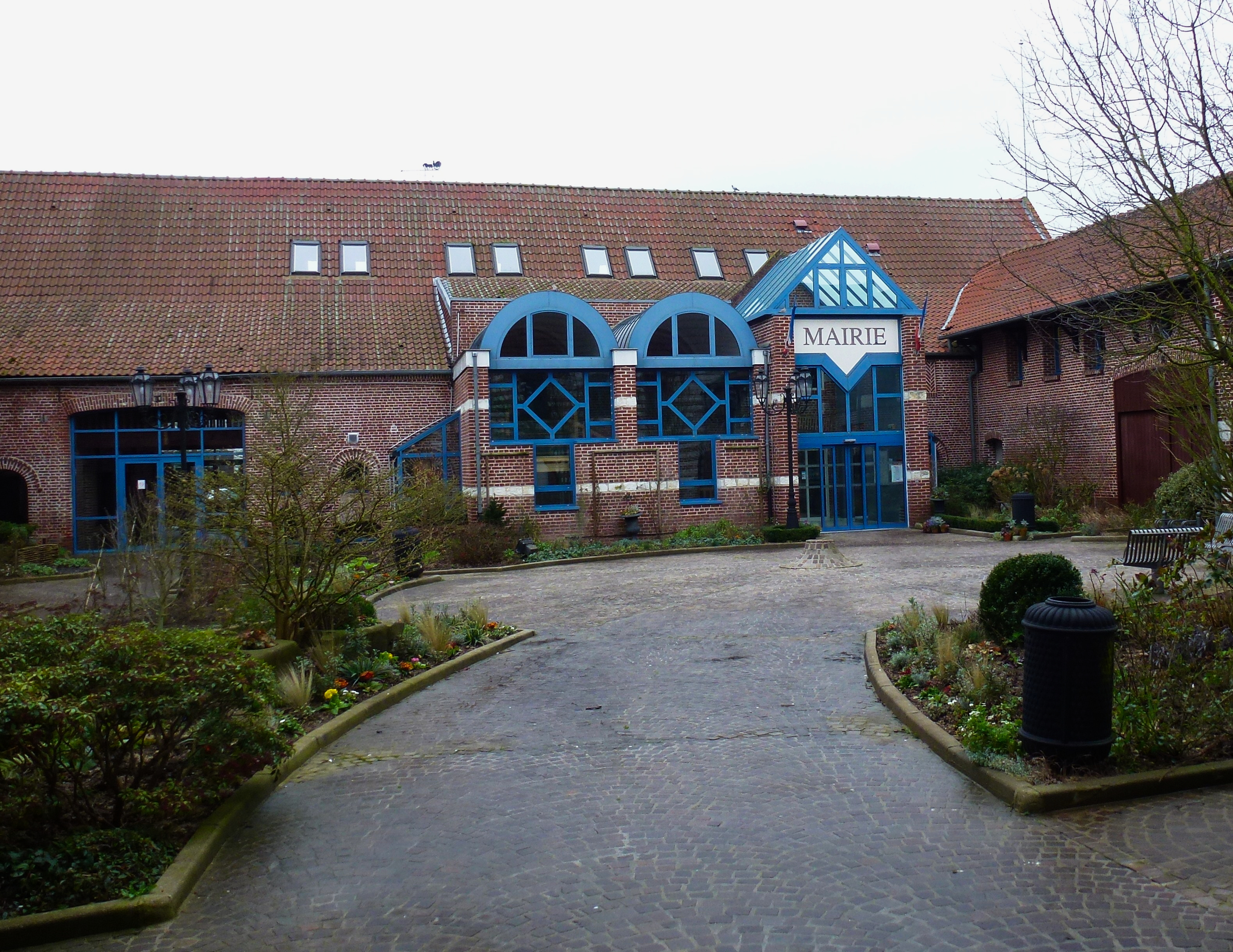 La mairie de Noyelles-lès-Seclin, Nord.- France.